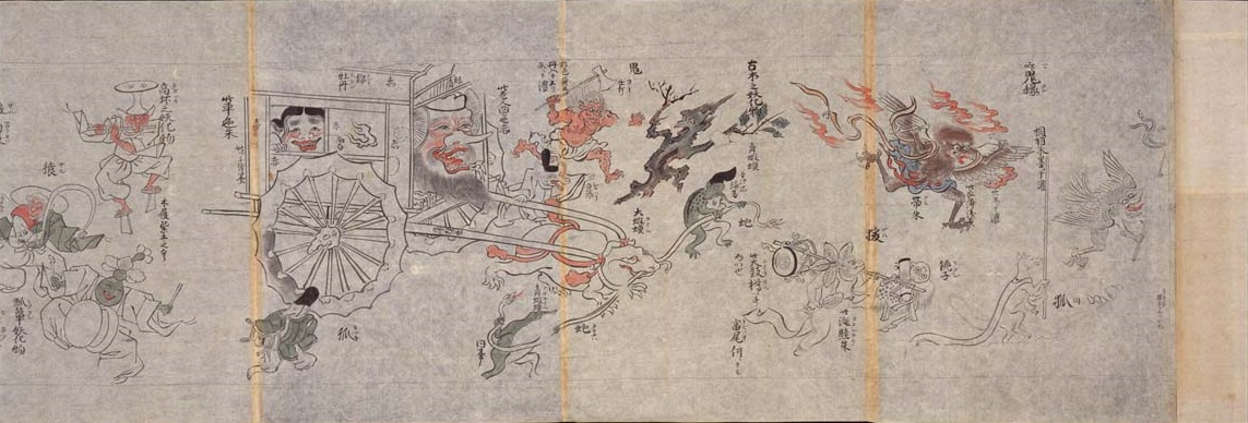 Version du Hyakki Hyagyo Emaki du musée national de Tokyo.